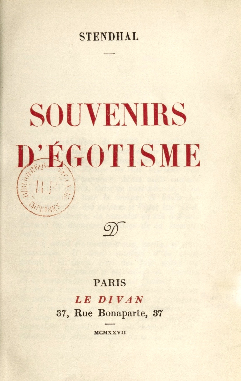 Stendhal, "Souvenirs d'égotisme", édition 1927. Révision texte et préface par Henri Martineau.